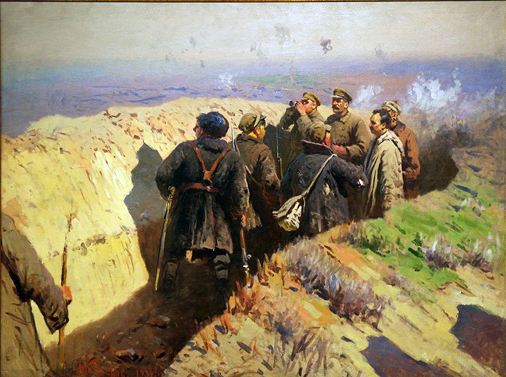 Оборона Царицына